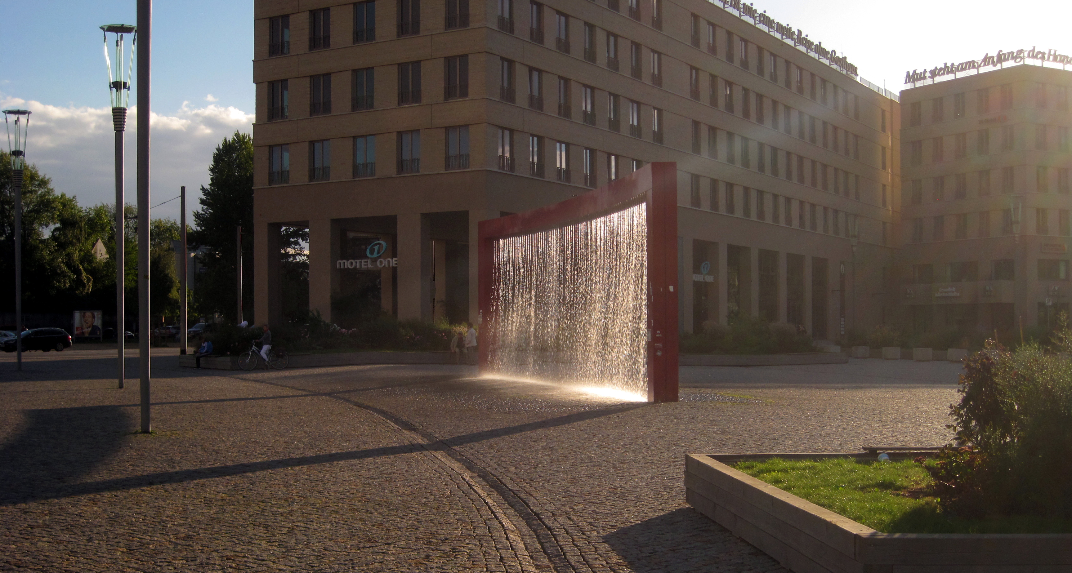 Kunstprojekt Wasserskulptur „Waterscreen“ bei Sonnenuntergang, Postplatz nahe dem Schauspielhaus in Dresden. Künstler Rainer Splitt. Der 4 Meter hohe und 12 Meter breite rote Rahmen mit dem Wasserspiel soll Bühne und Vorhang symbolisieren.